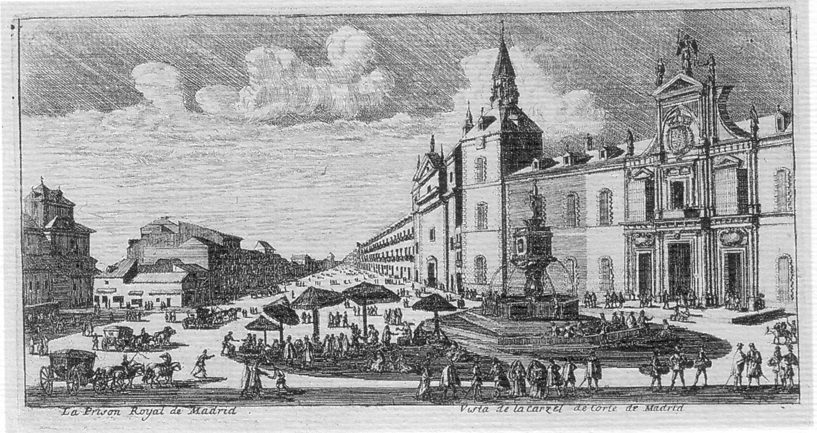 Vista de la Plaza de Santa Cruz de Madrid, la Cárcel de Corte y la fuente de Orfeo de Rutilo Gaci; al fondo se extiende la calle de Atocha. Cobre, talla dulce (132 x 246 cm.)